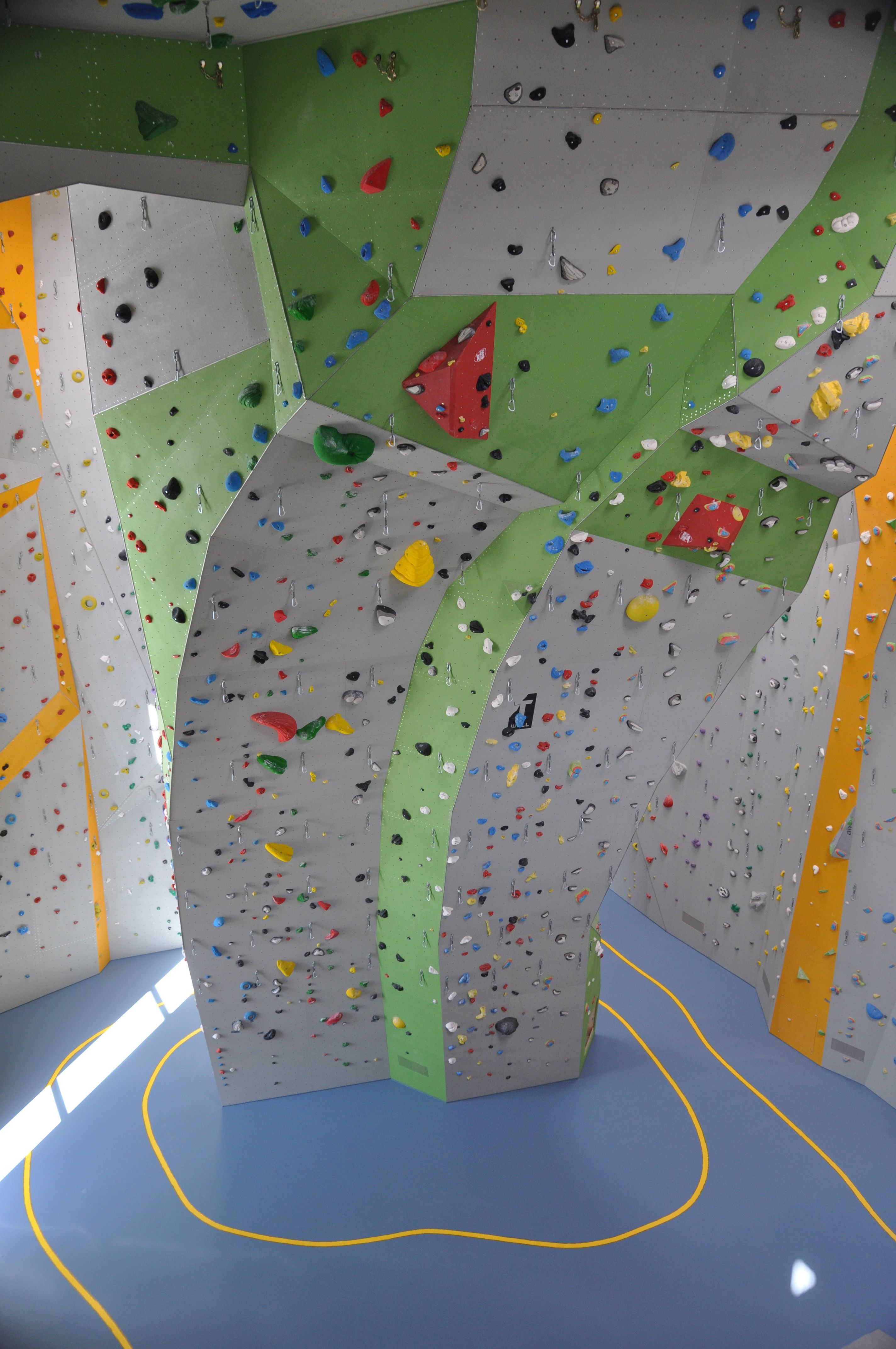 Kletterzentrum der DAV-Sektion Berlin in der Seydlitzstraße 1 H, 10557 Berlin